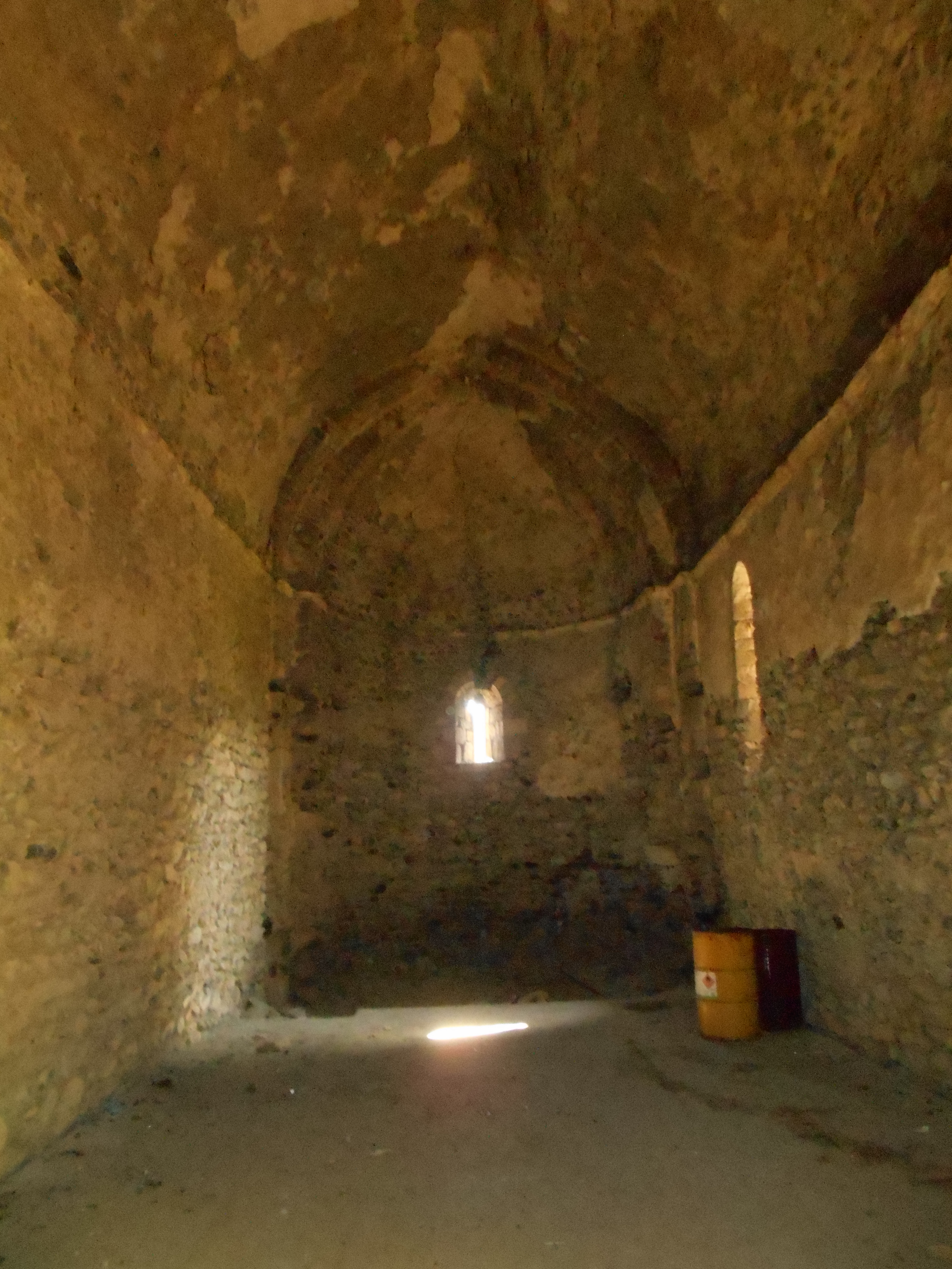 Antiga església parroquial de Santa Eulàlia de Vilella. Interior. Capçalera